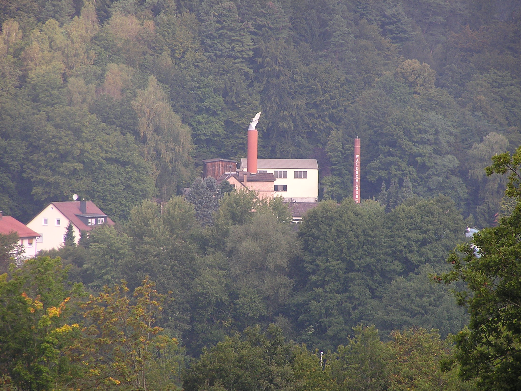 Waldschloss-Brauerei in Frammersbach (Landkreis Main-Spessart, Unterfranken, Bayern, Deutschland) vom Bäckersberg